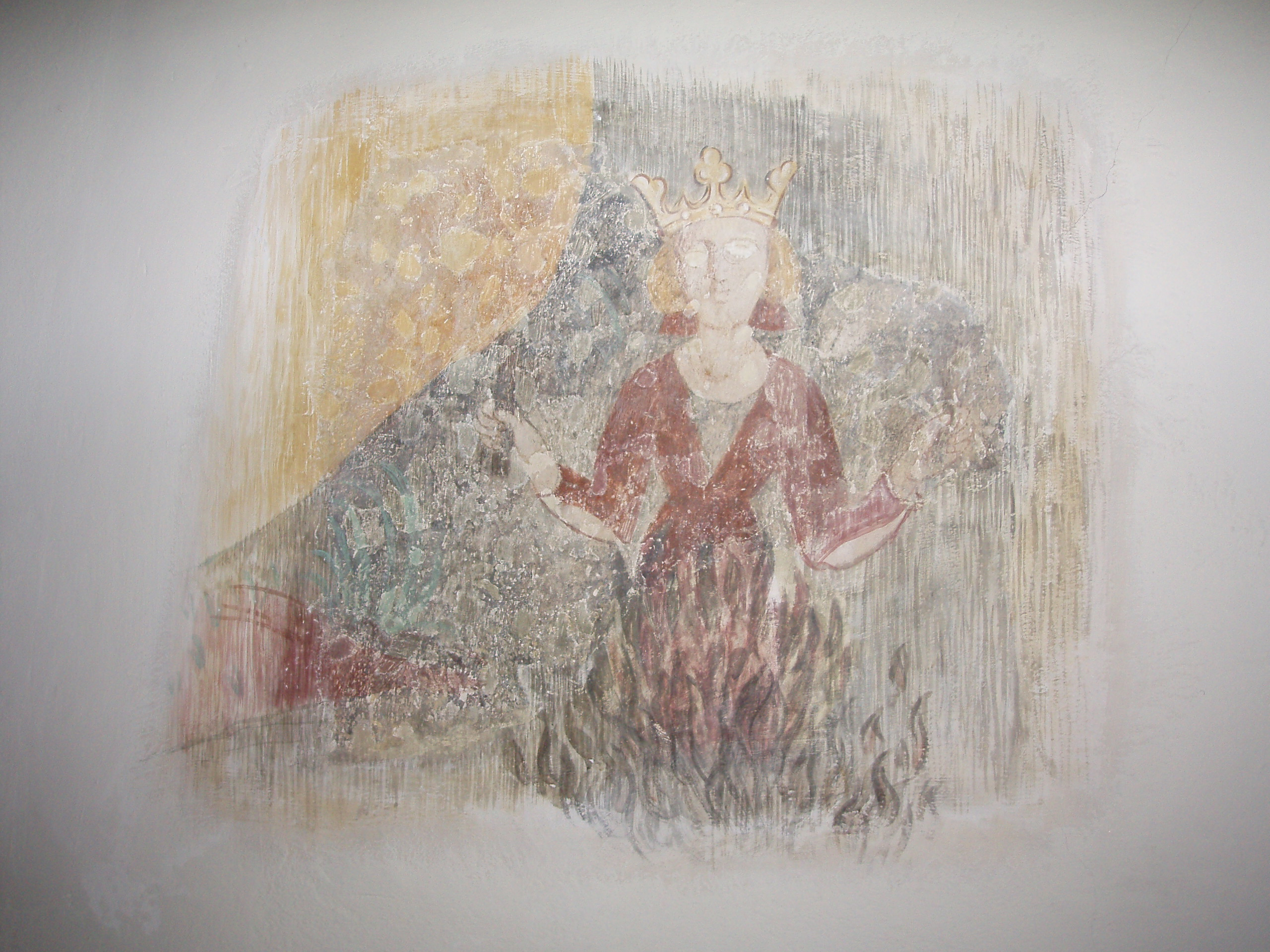 Wandmalerei in der Cyriakskirche